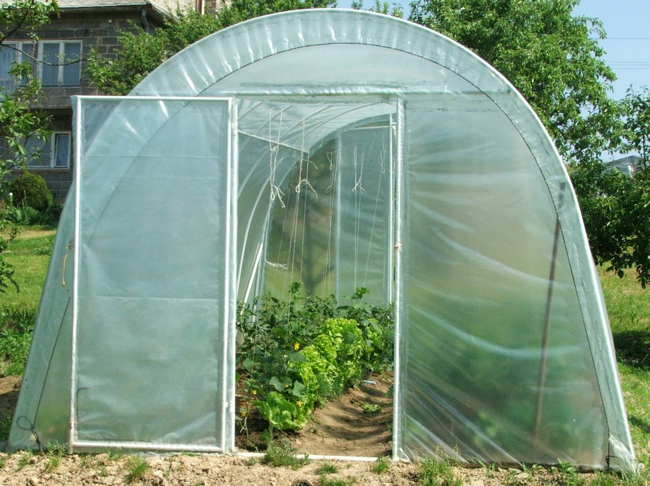 Mały przydomowy tunel foliowy Data:2006-05-10 Autor:Jerzy Opioła